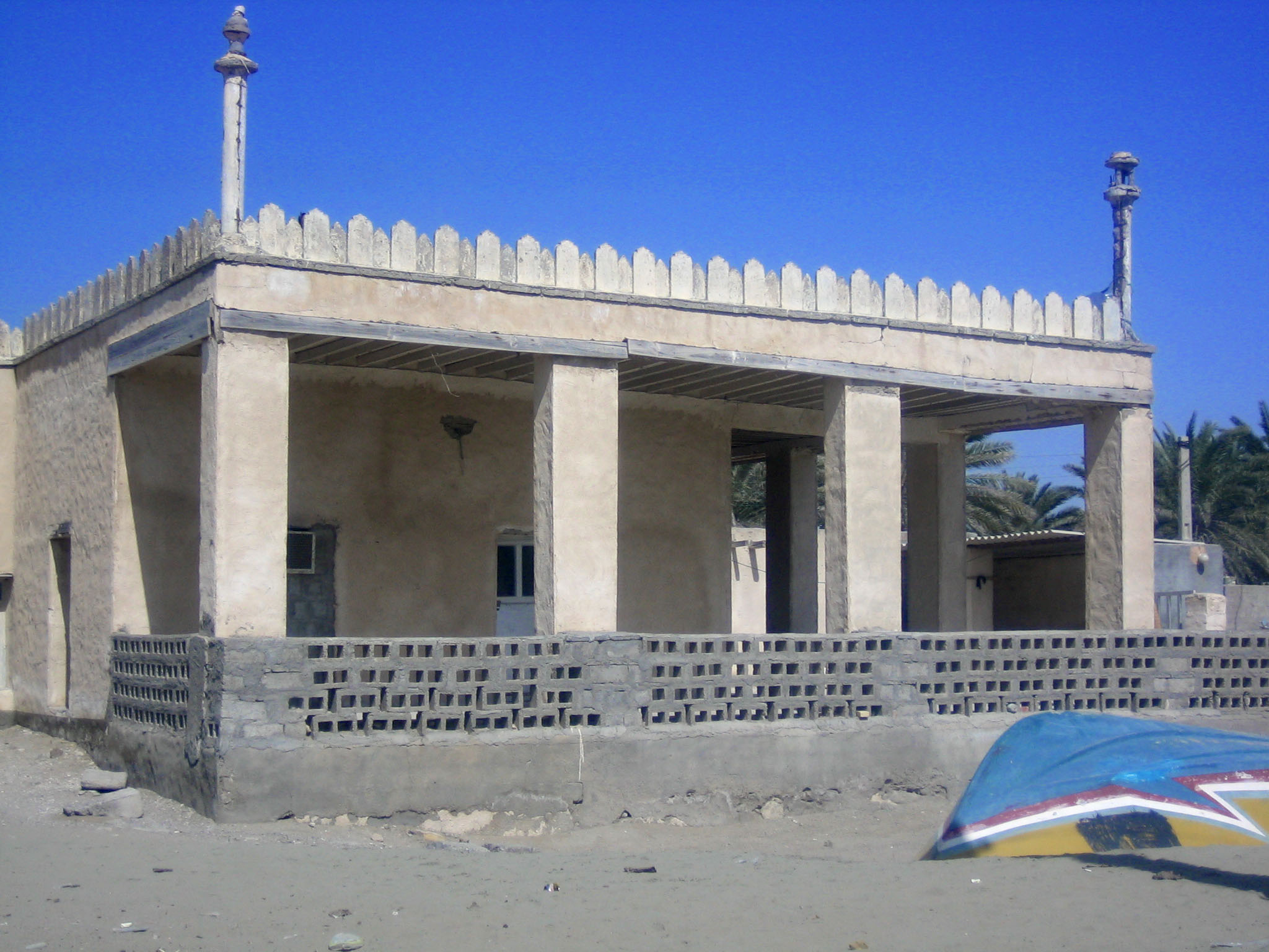 lمسجد قدیمی کوهستک